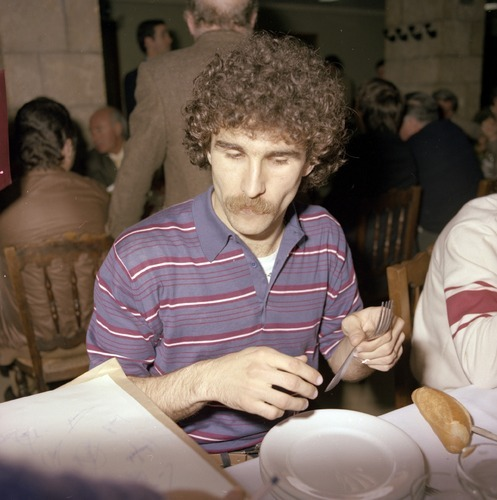 Jesus Mari Zamora in 1981